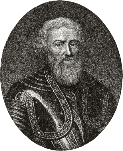 Артамон Сергеевич Матвеев (1625 - 1682)